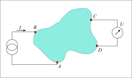 Bild zum Van-Der-Pauw-Messverfahren